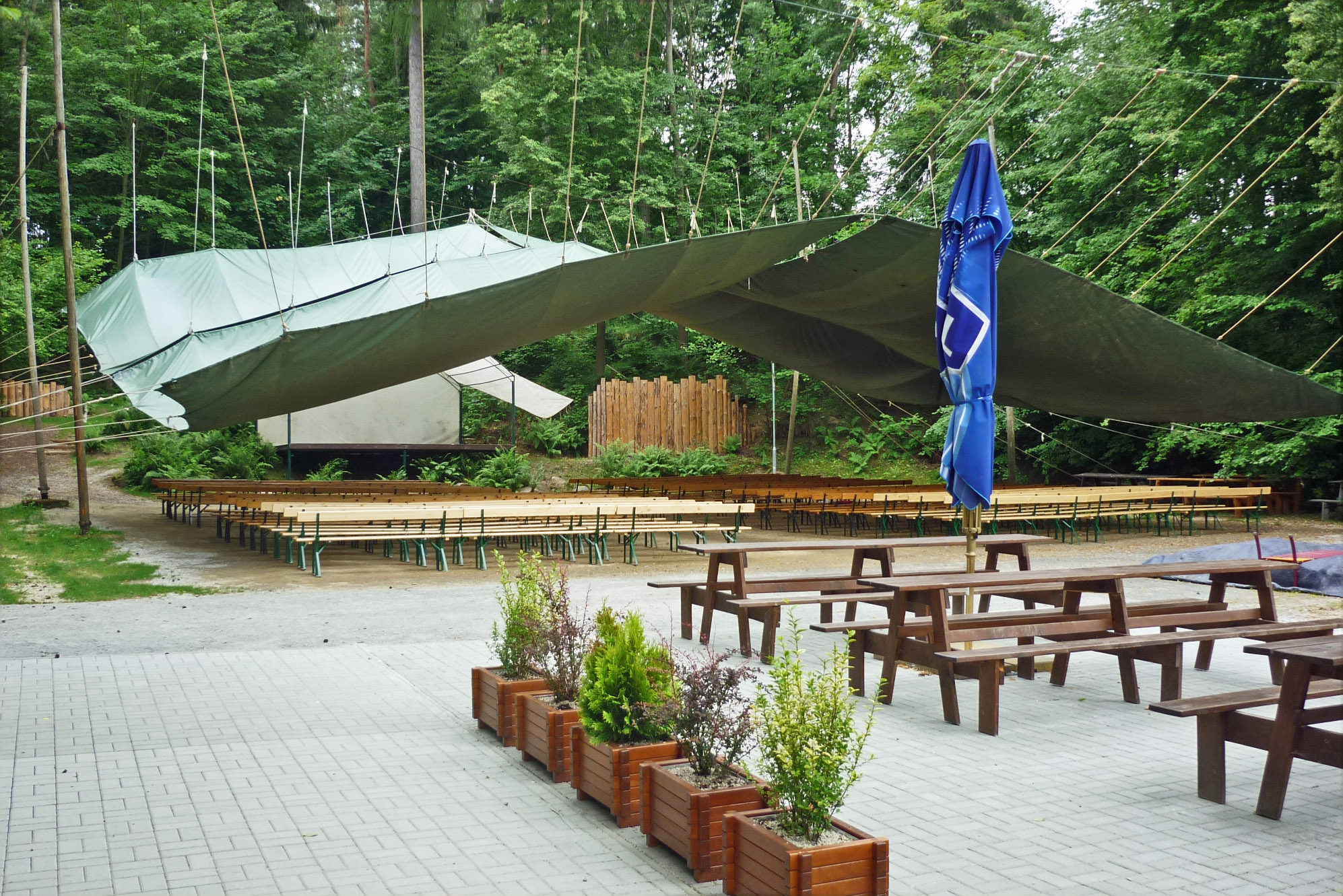 Passionsspieltheater in Höritz (Hořice na Šumavě) im Böhmerwald